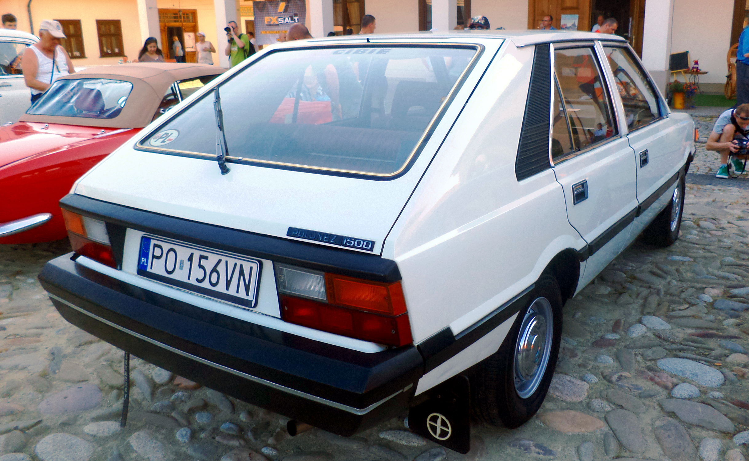 FSO Polonez MR'78 podczas V Zlotu Samochodów Zabytkowych "Retro" w Nowym Sączu.